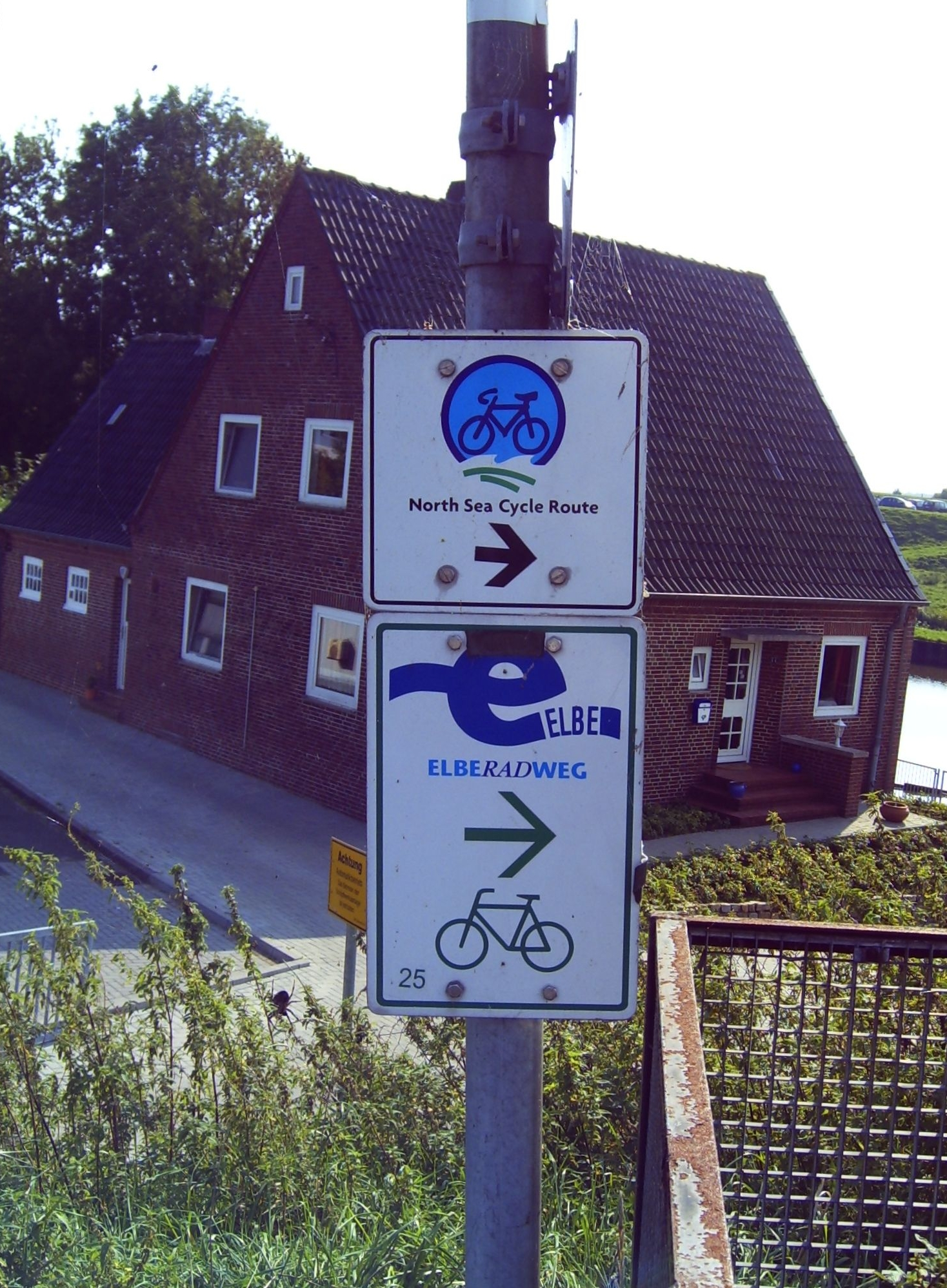 Bilder aus Glückstadt, Deutschland.